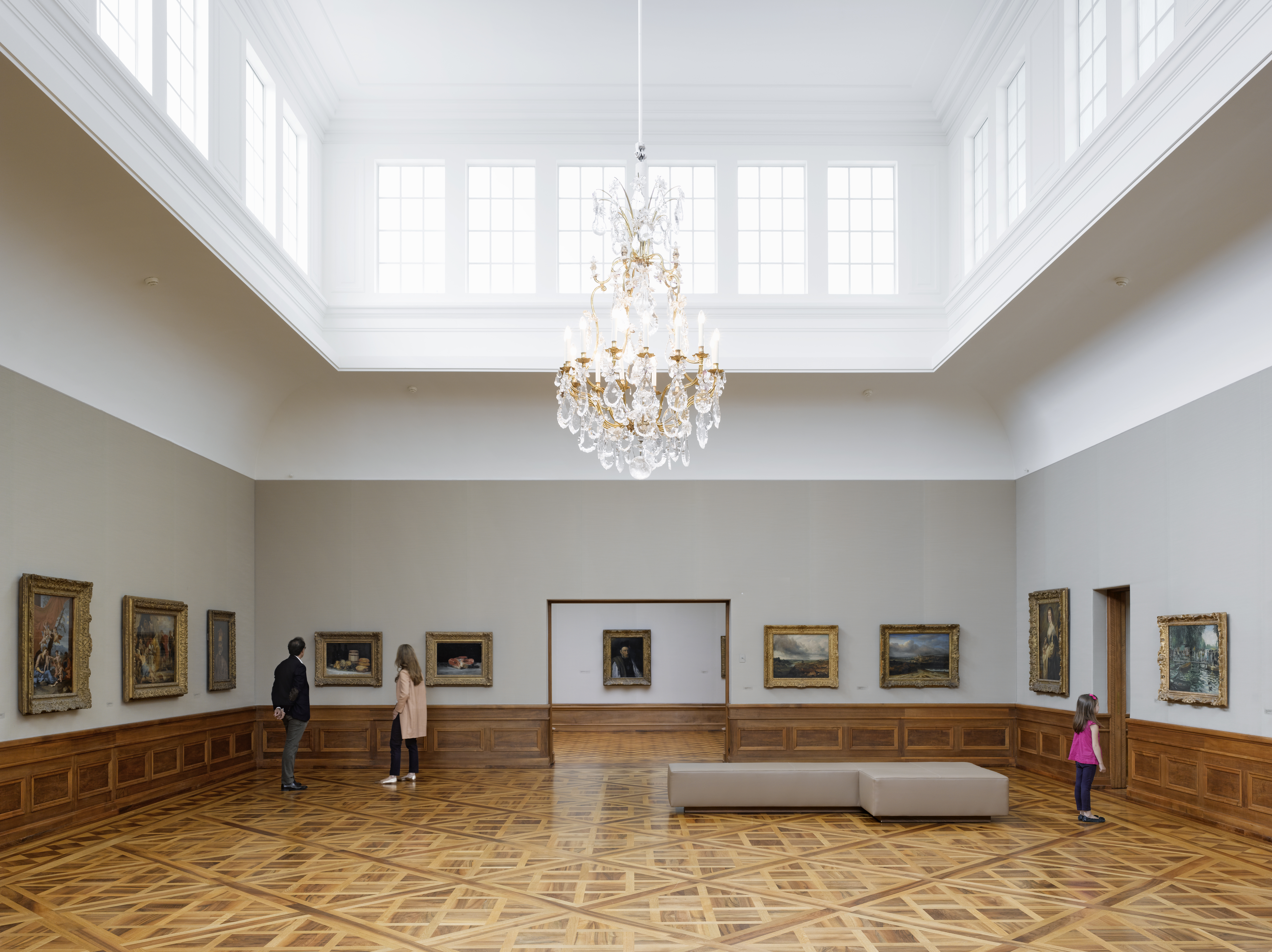 Innenraum